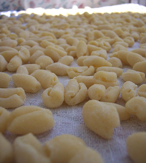 pasta fatta in casa :P